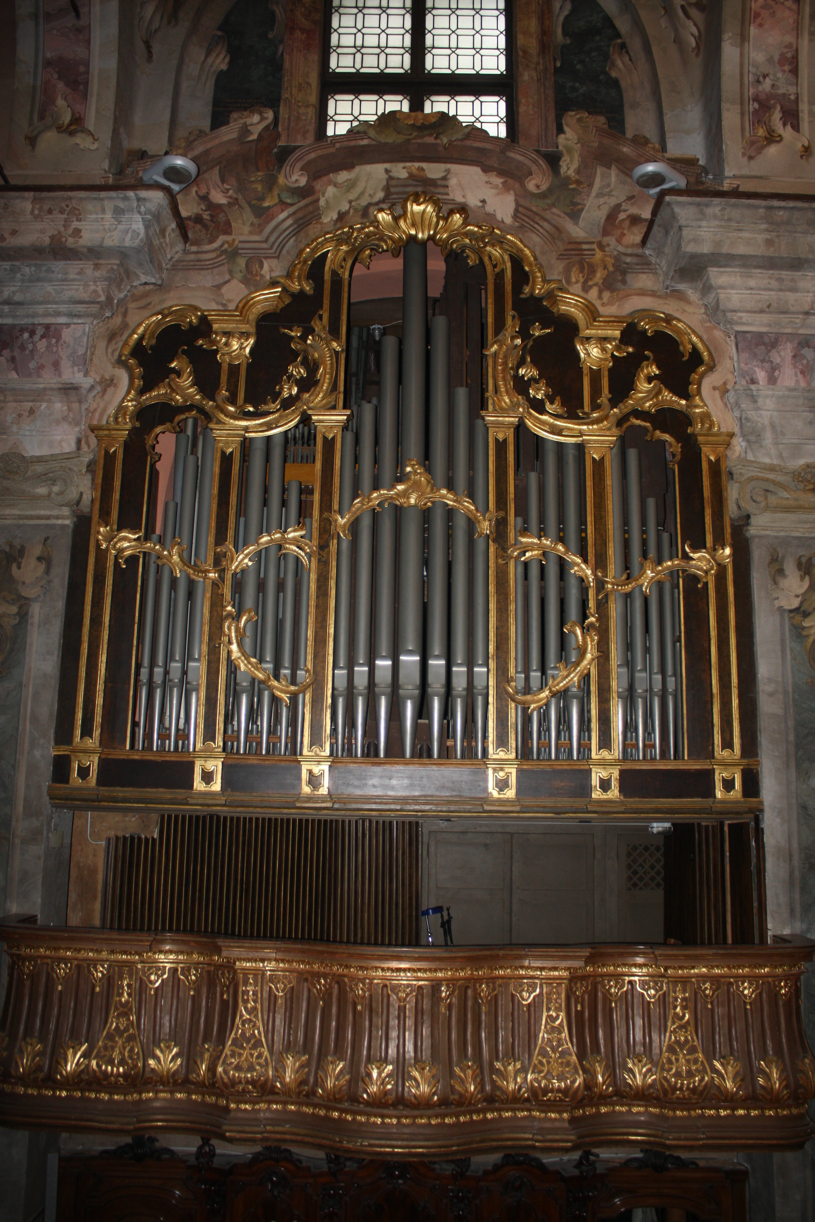 Basilica di San Giovanni Battista: organo a canne. This is a photo of a monument which is part of cultural heritage of Italy.